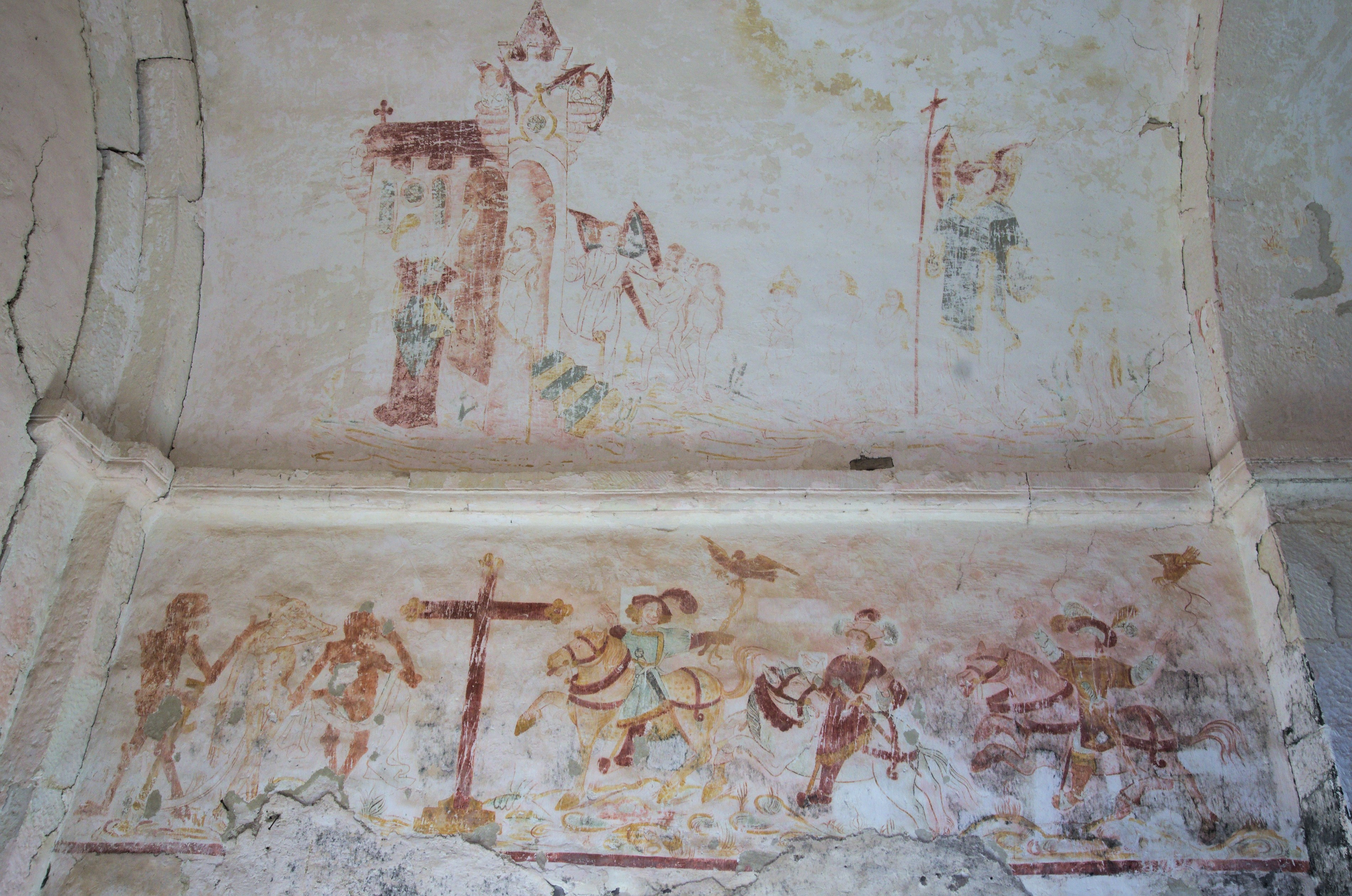 Chapelle du Vieux Astre à Sepvigny. Vieux Astre signifiant cimetière. Fresque du XVe siècle